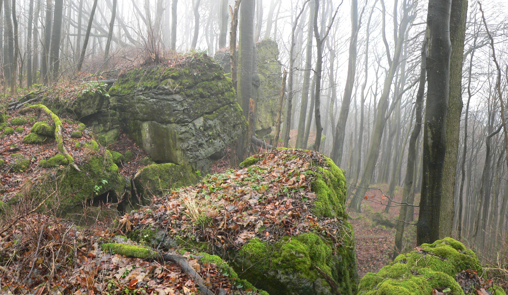 Klippen und Felsen im Naturschutzgebiet Ith